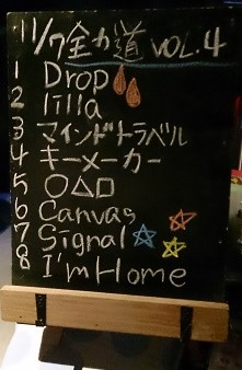 amiinaセトリボード(20151107(1))